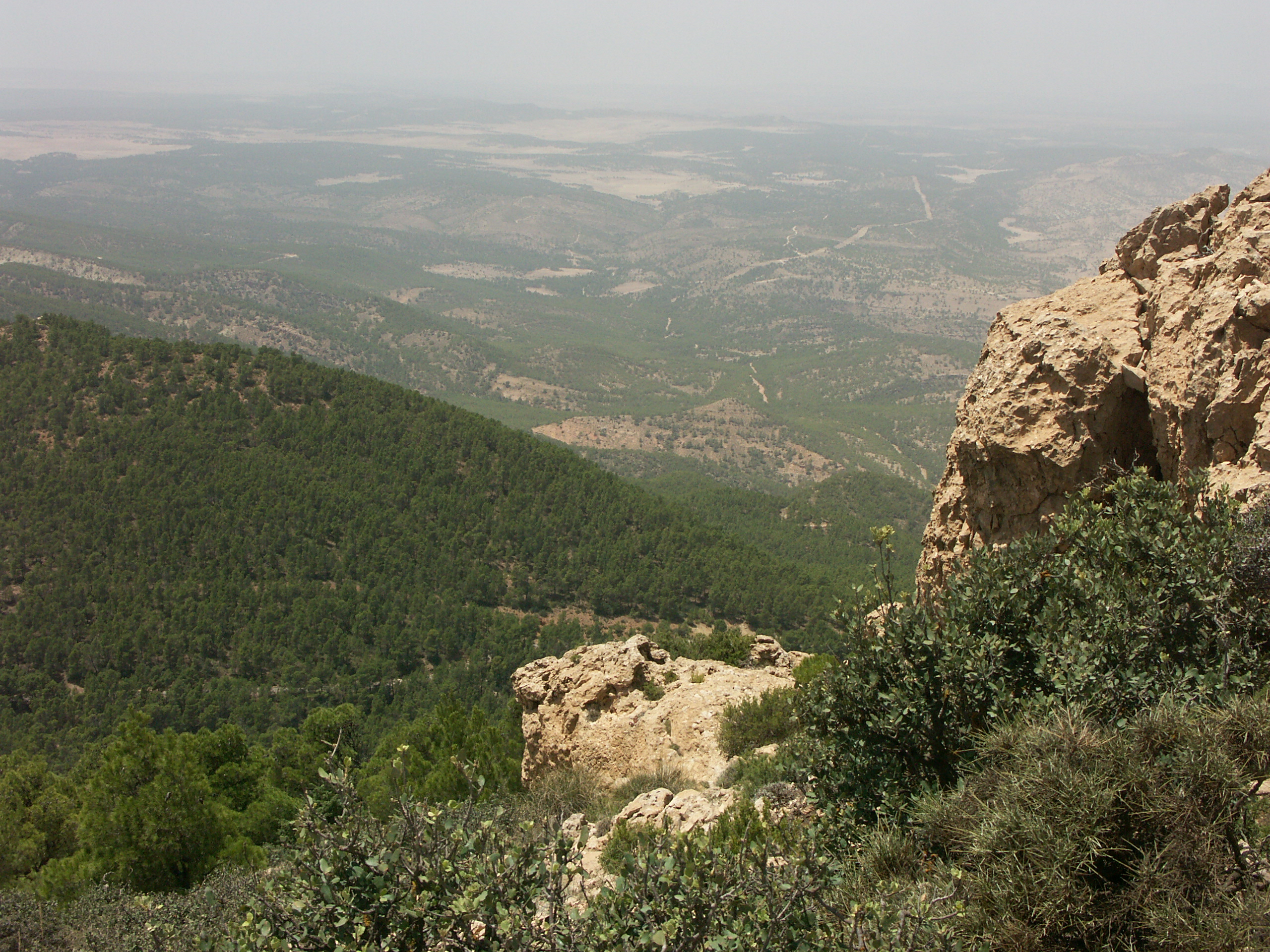 L'Algérie vue du Mont Chambi (Kasserine)